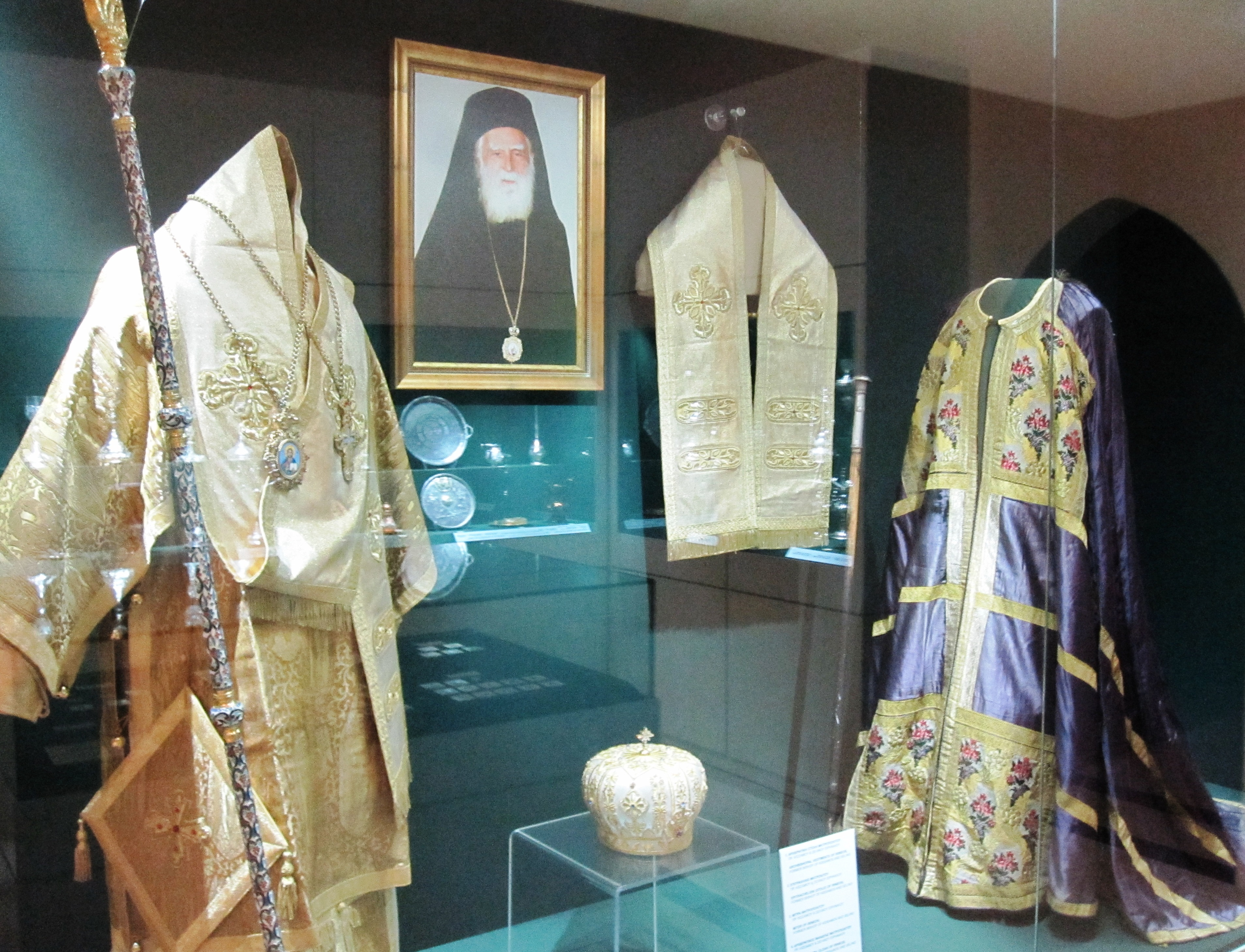 Liturgische Gewänder des ehem. Metropoliten Ireneos (Museum des Klosters Agia Triada, Kreta